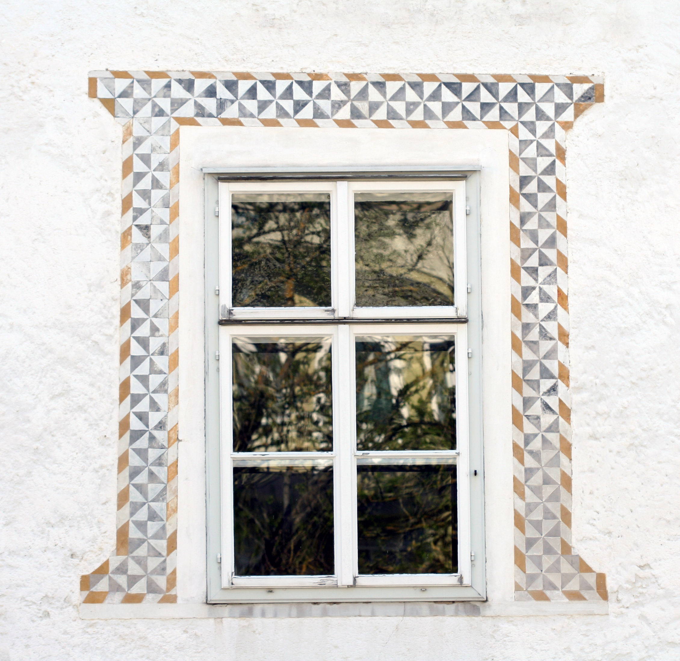 Bücherei Scheibbs